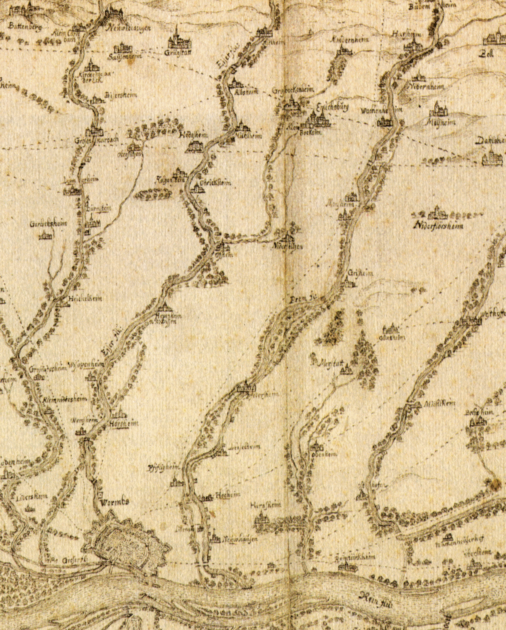 Bildplan des Eisbachlaufs von Asselheim bis Worms im Jahre 1690. Sepiazeichnung von Peter Hamman (1624-1692). Ausschnitt mit dem Unterlauf von Eckbach, Eisbach und Pfrimm. Original im Stadtarchiv Worms. Erstveröffentlichung in: Heinrich Boos (Hg): Monumenta Wormatiensia. Berlin 1893, Tafel VI.